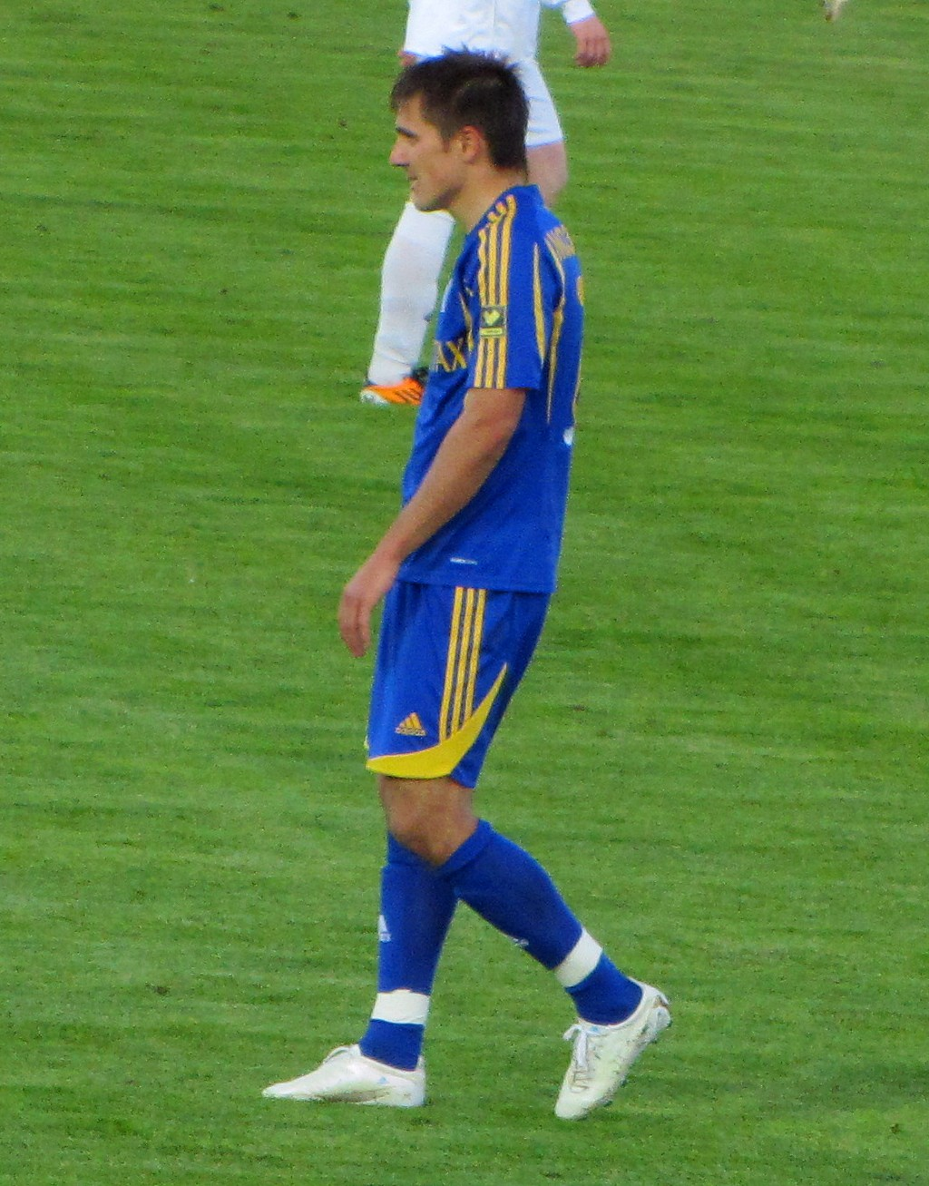 Игрок ФК БАТЭ (Борисов, Беларусь) Дмитрий Мозолевский